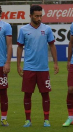 Ferhat Yazgan'ı yakaladık